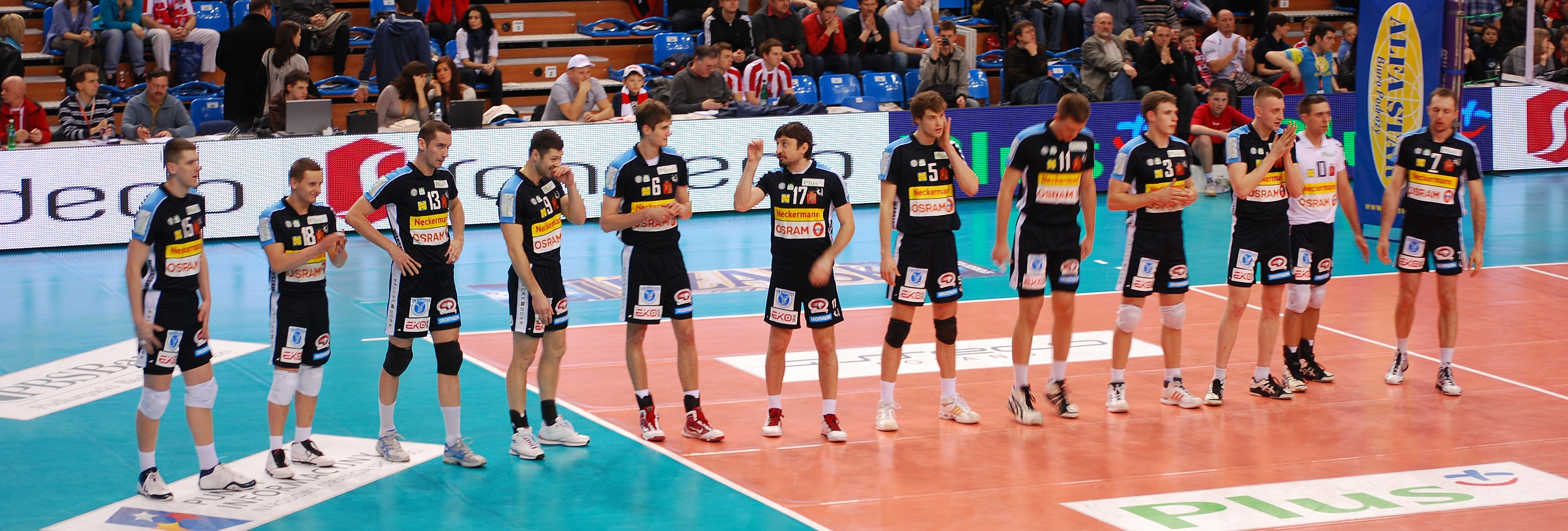 Neckermann AZS Politechnika Warszawska przed meczem z Asseco Resovią Rzeszów w Hali Podpromie.